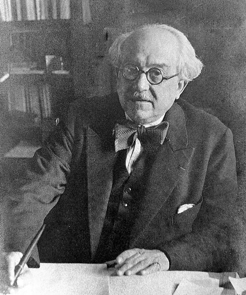 Photo familiale de Marcel Rouff publié par Françoise Colin en 1988